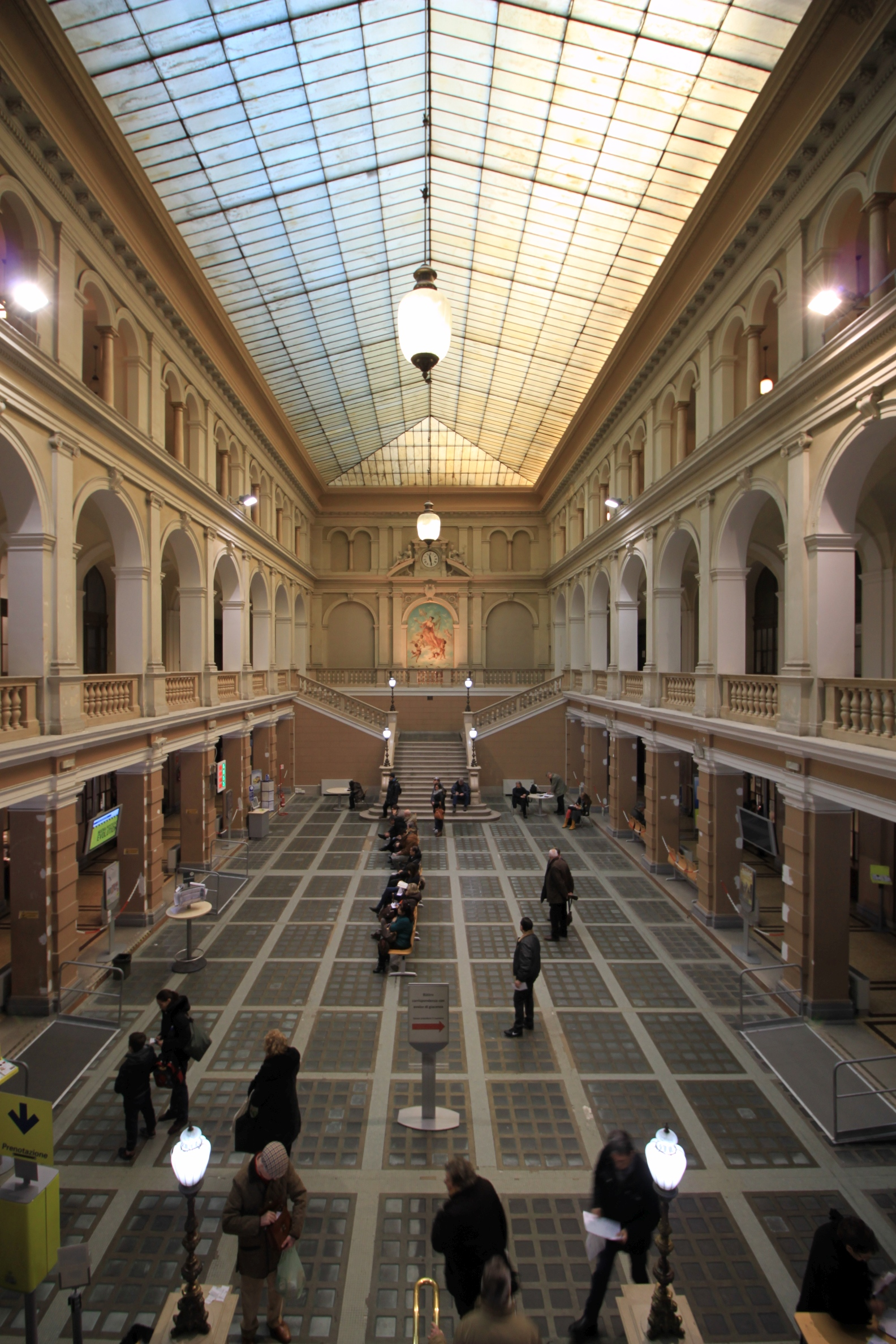 Palazzo delle Poste, Piazza Vittorio Veneto, Trieste; Interiore